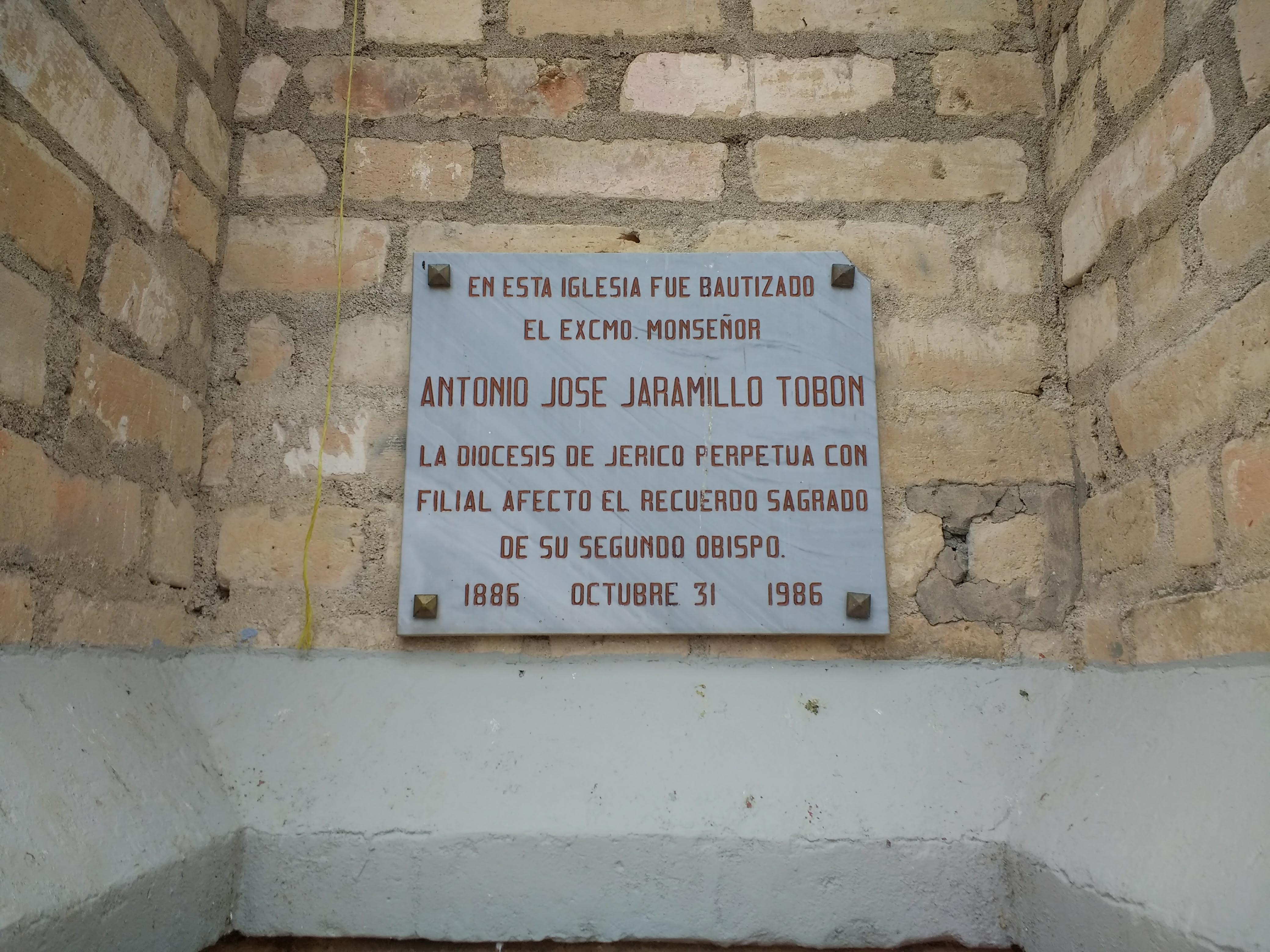 Placa en el exterior de la Iglesia de Nuestra Señora del Rosario, Belmira